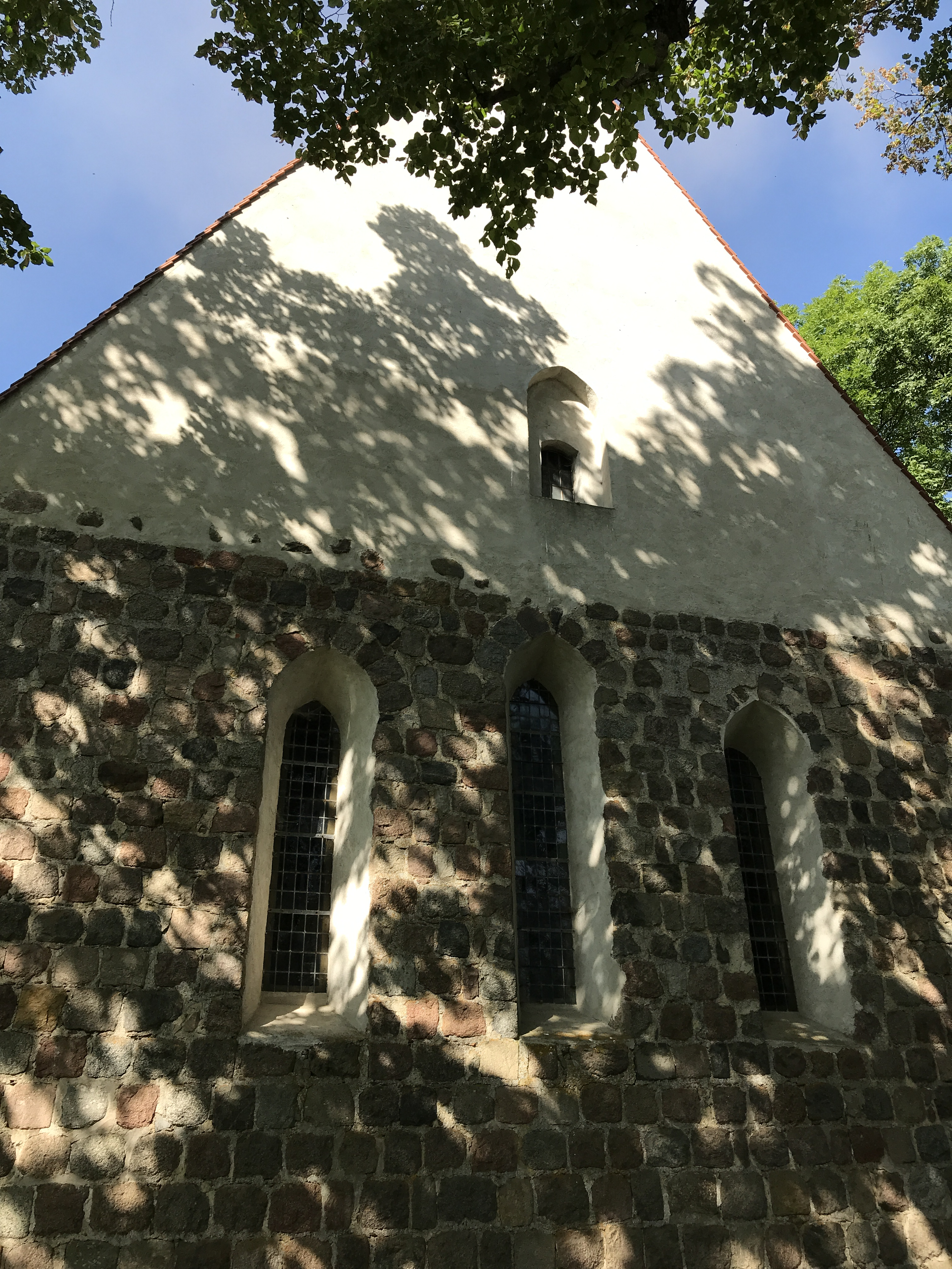 Die Kirche Dargitz ist eine Feldsteinkirche aus der zweiten Hälfte des 13. Jahrhunderts in Schönwalde im Landkreis Vorpommern-Greifswald im Land Mecklenburg-Vorpommern. Im Innern steht unter anderem ein Altaraufsatz aus dem Anfang des 18. Jahrhunderts.